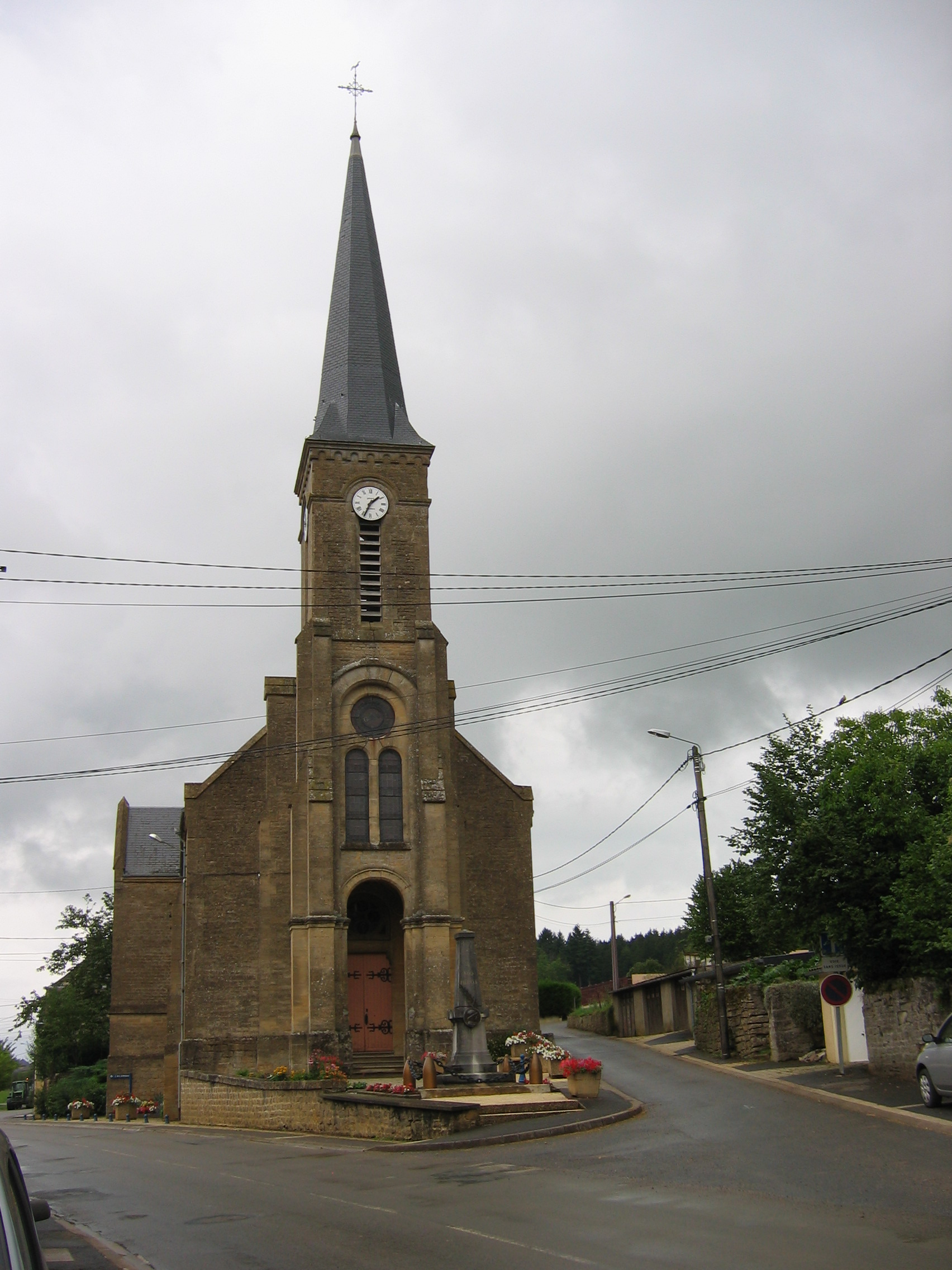 Eglise Angecourt Ardennes France